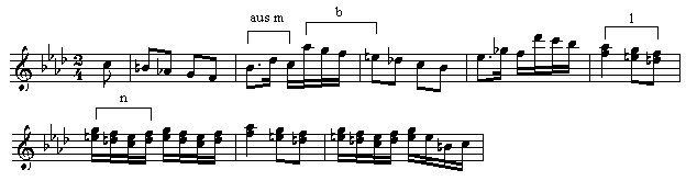 GNU-FDL, selbst erstellt